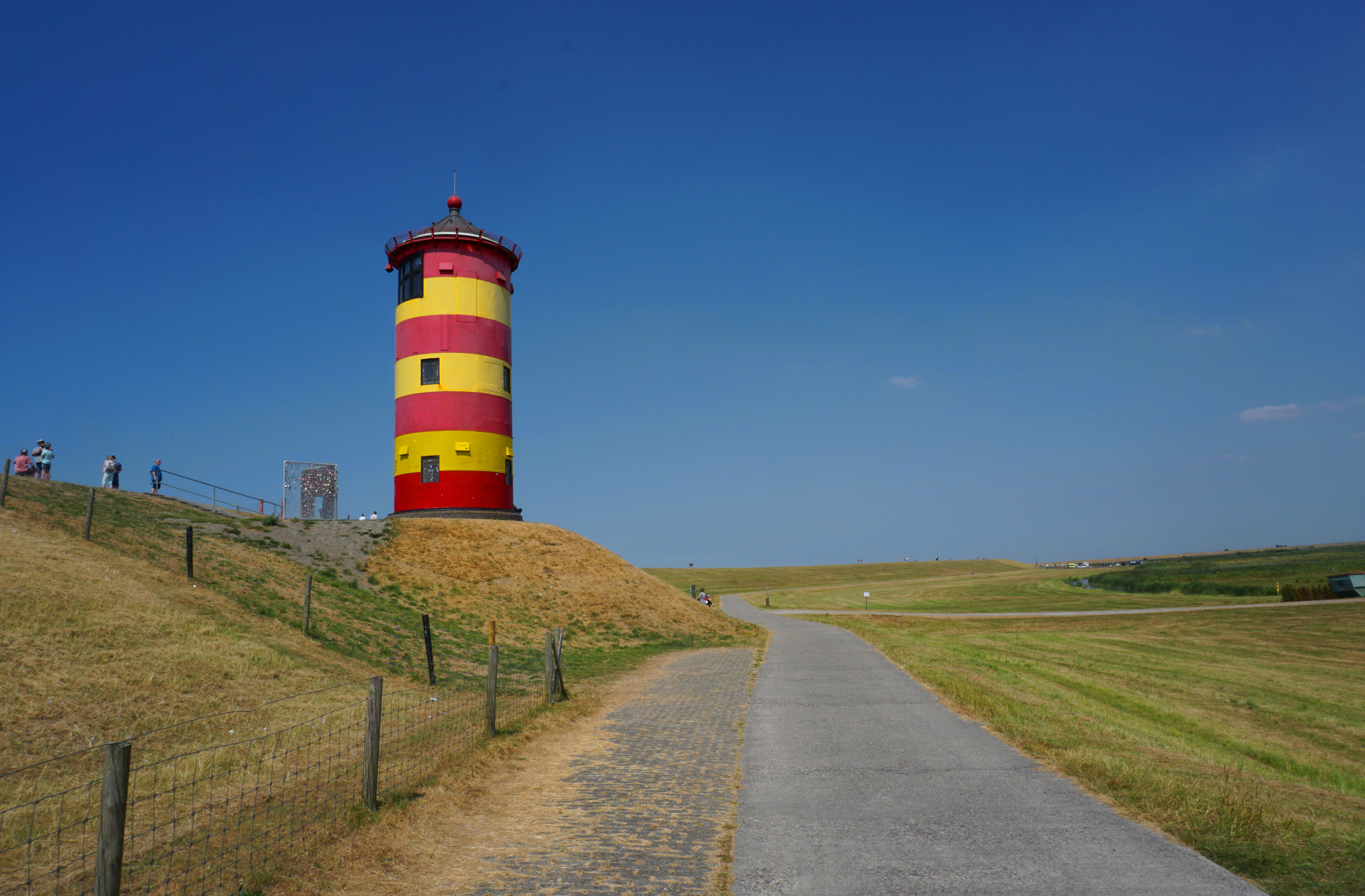 Leuchtturm Pilsum in Ostfriesland an der Nordsee, Deutschland